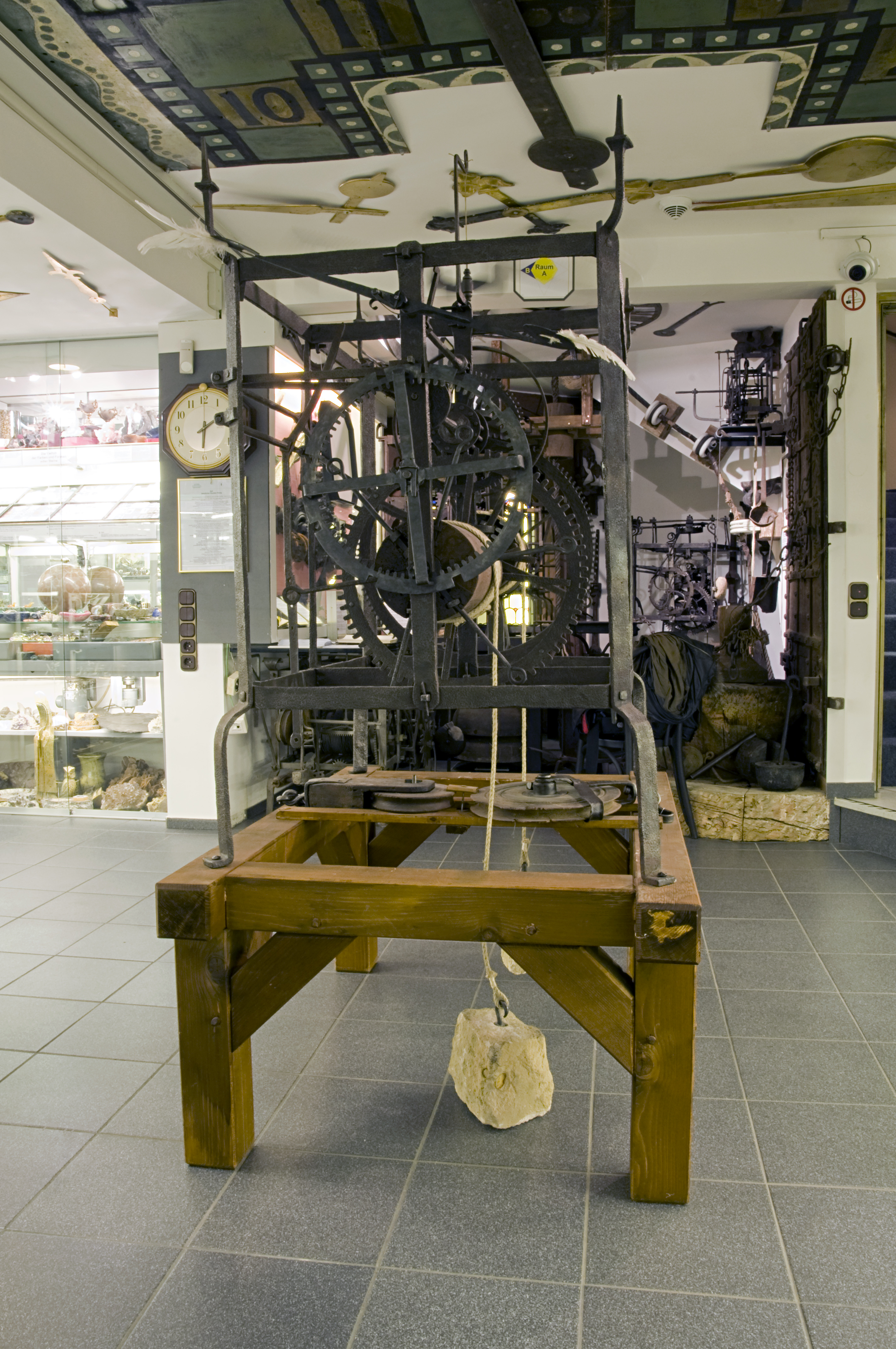 Museum für Uhren, Schmuck und Kunst Frankfurt am Main Ausstellungsraum A mit Turmuhr